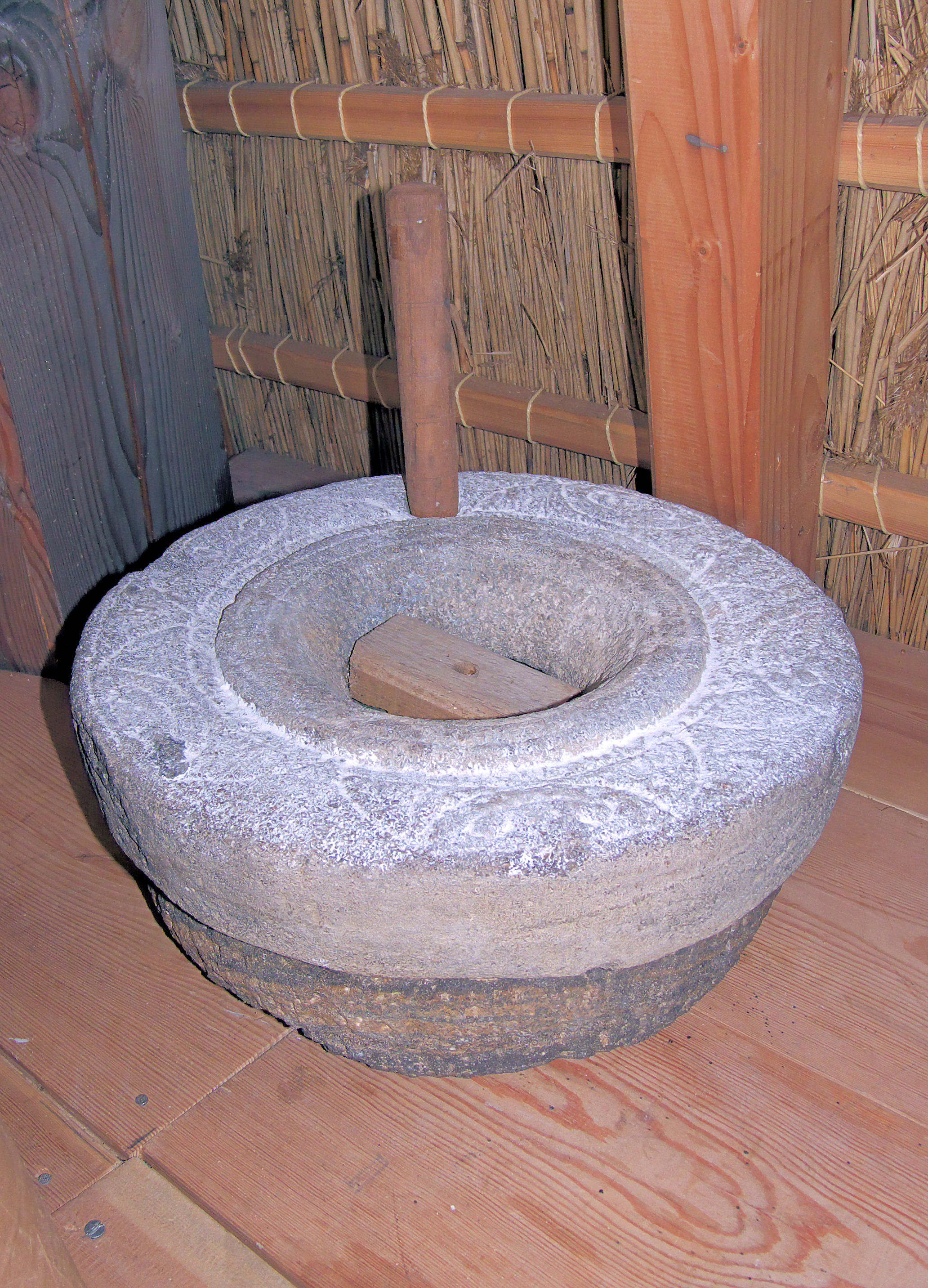 Molen De Hoop, Bunschoten, kweern handmolen